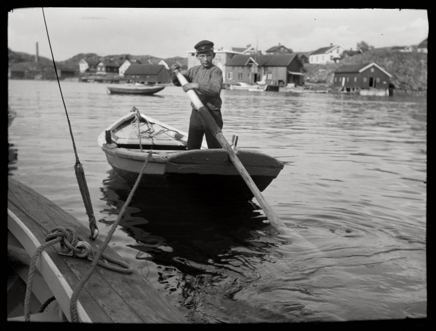 Pojke i båt med åra.